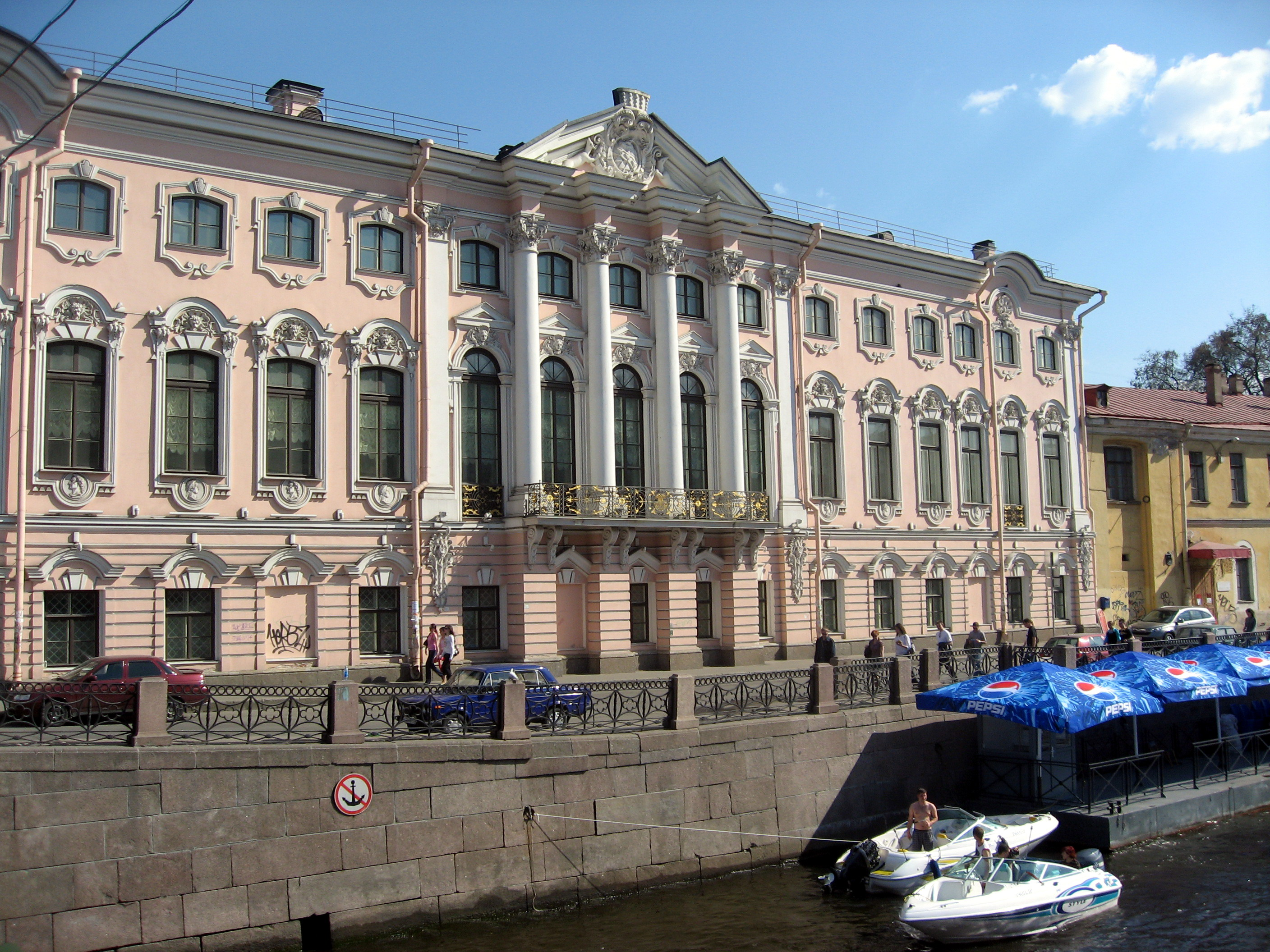 Sankt-Petěrburg